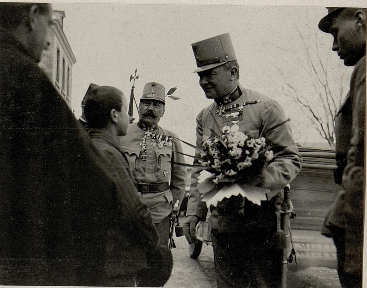 Albanischer Junge überreicht einer Blumenstrauss und deklamiert. Aufgenommen in Skutari am 14. März 1916.